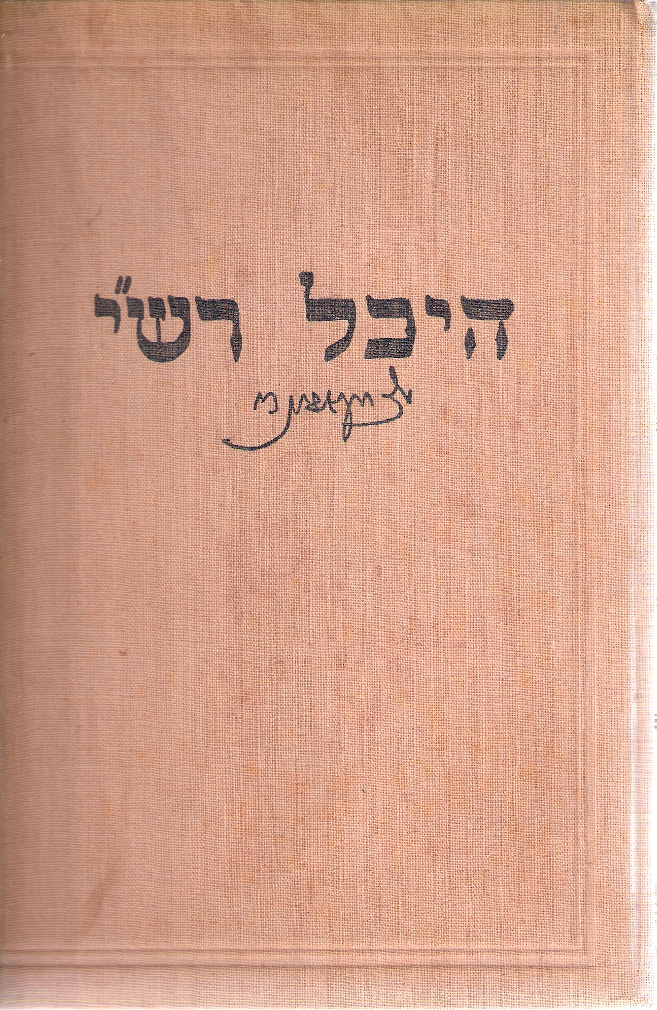 כריכת ספרו של יצחק אבינרי היכל רש"י